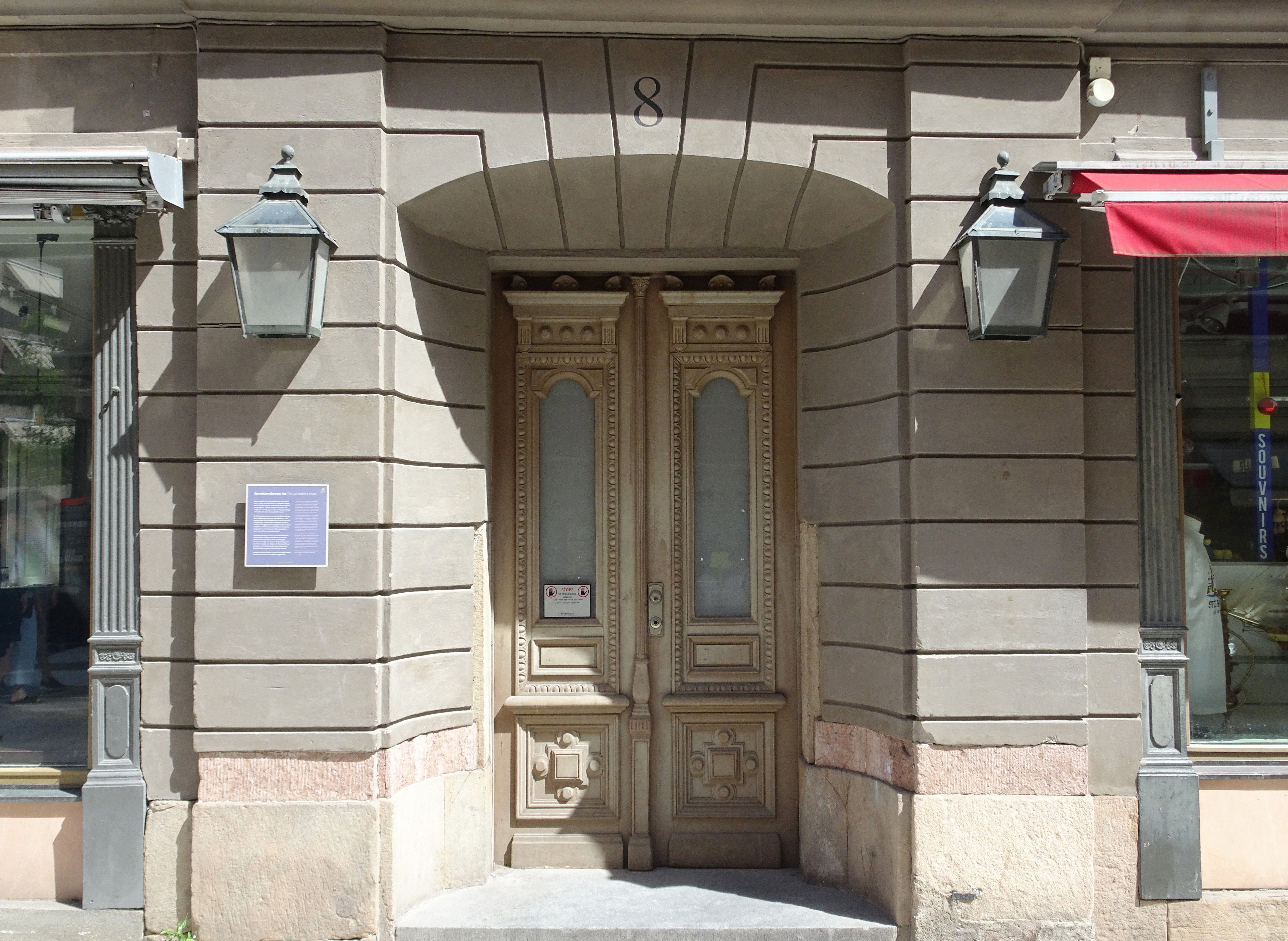 Drottninggatan 8, Kanngjutarmästarens hus (portal), byggår 1640, ett av de bäst bevarade bostadshusen från 1600-talet utanför Gamla stan.